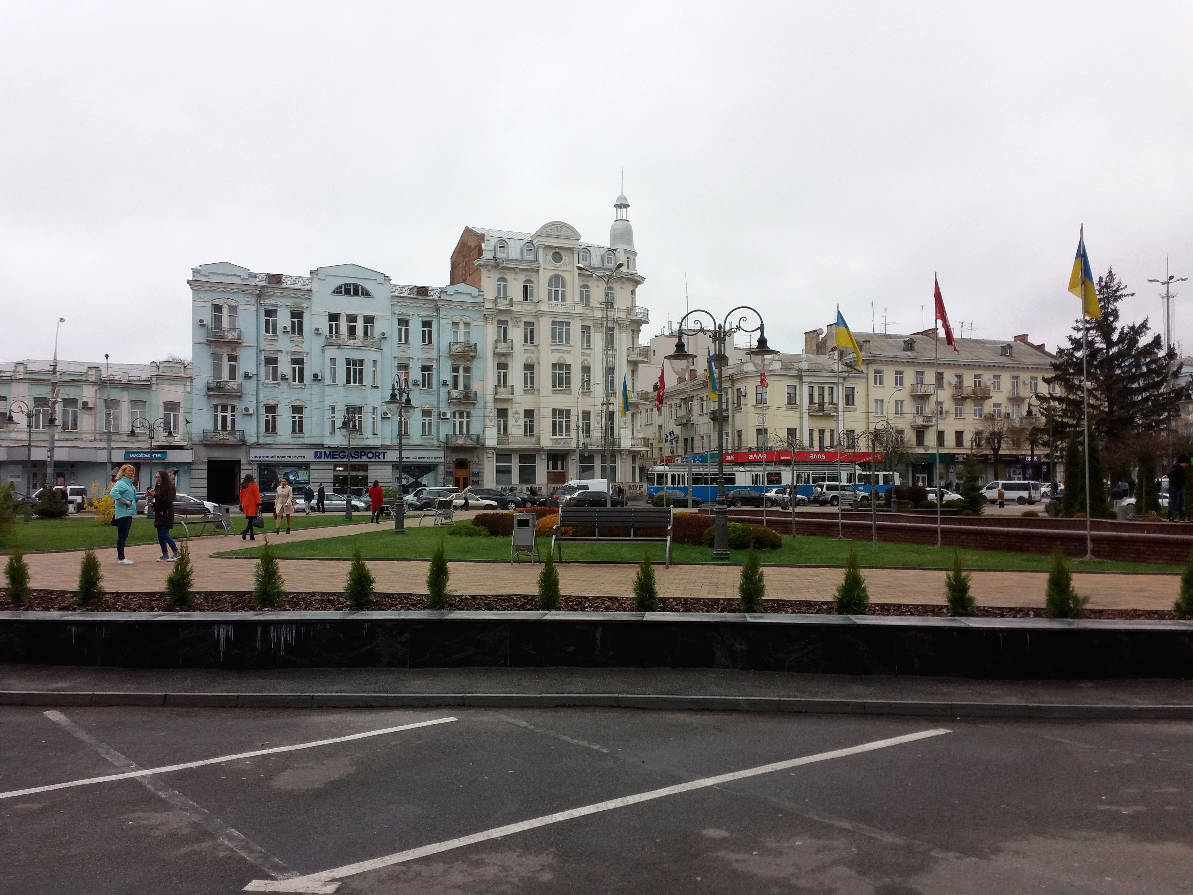 м. Вінниця, майдан Незалежності, вулиця Соборна